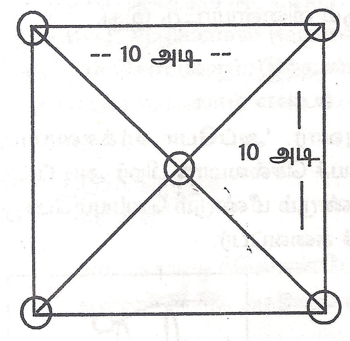 நாலுமூலைக்கல் விளையாட்டு அரங்கம். மறைகின்ற விளையாட்டுகள் என்னும் எனது நூலிலிருந்து எடுத்துப் பதிவேற்றப்பட்டது.